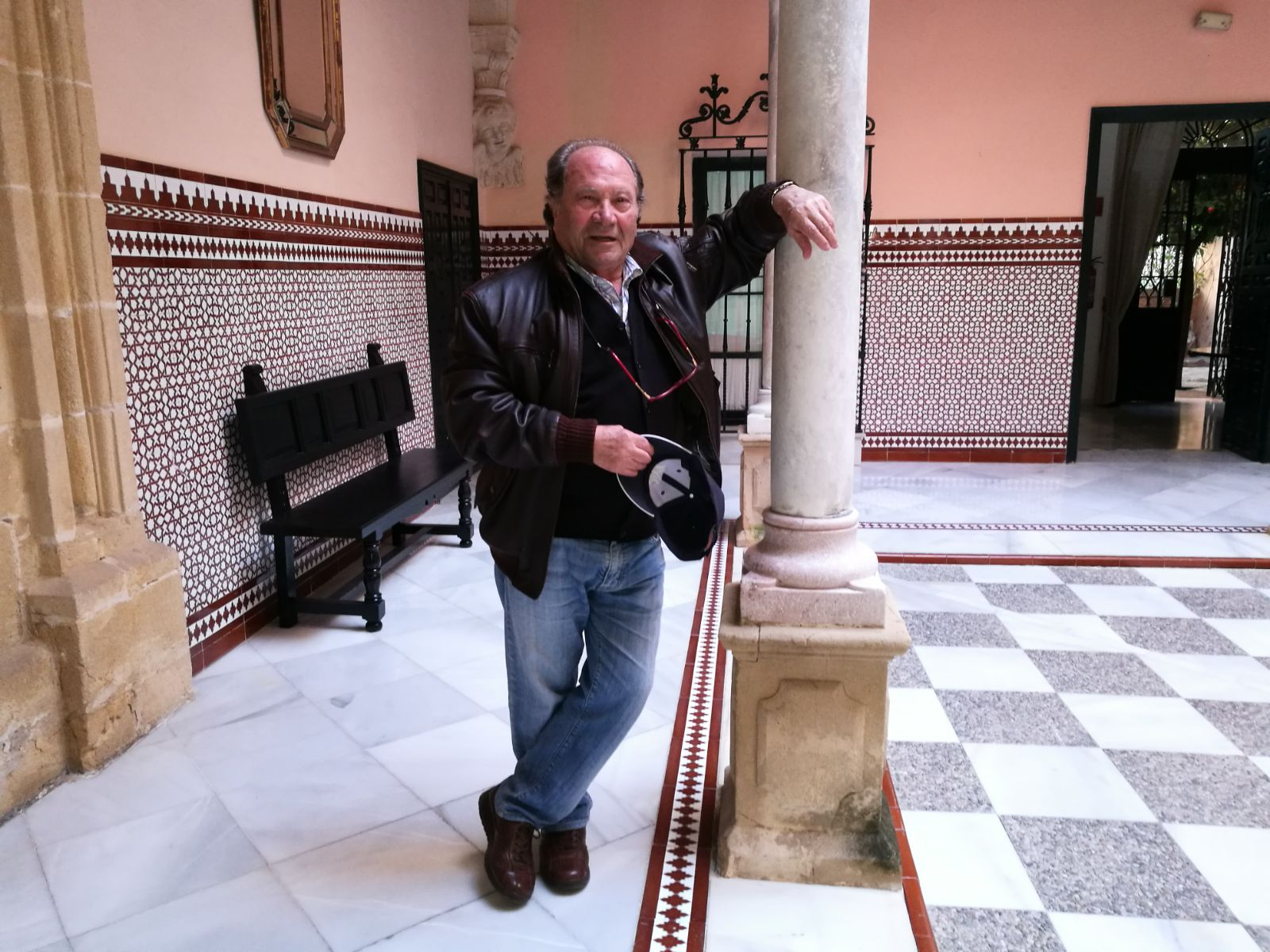 Manolo Marín, en el patio del Palacio Pemartín de Jerez, sede del Centro andaluz de Documentaciñón del Flamenco.